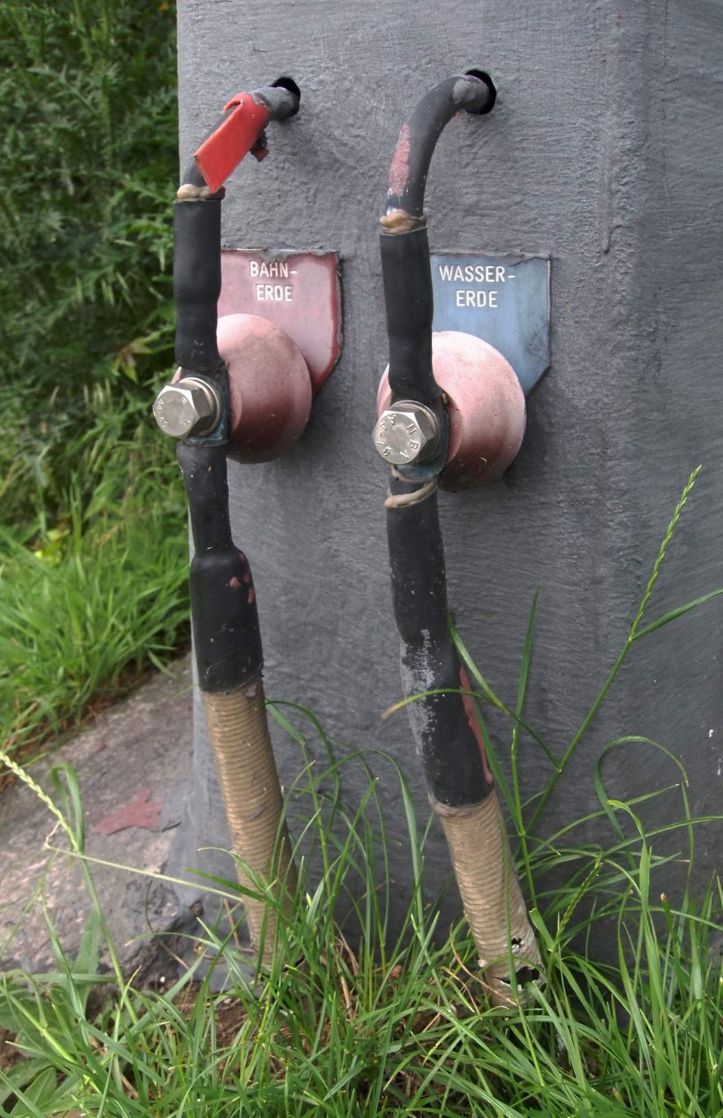 Bahnerde und Wassererde an einem Straßenbahnmast